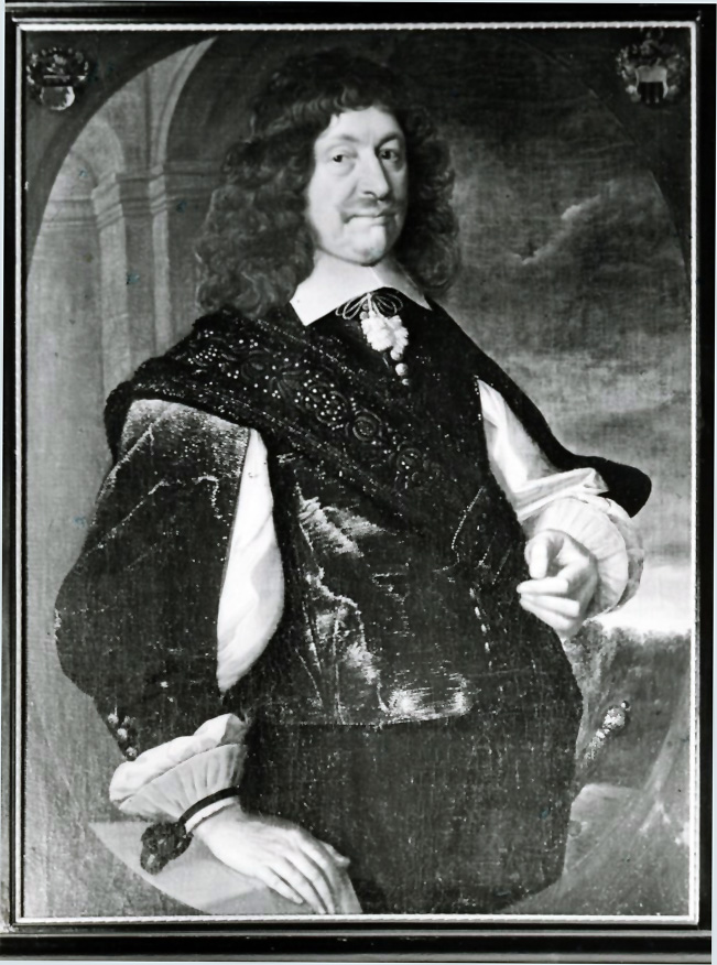 Johann Adolf Wolff Metternich, Gemälde von Christian Neumann aus dem Jahre 1654